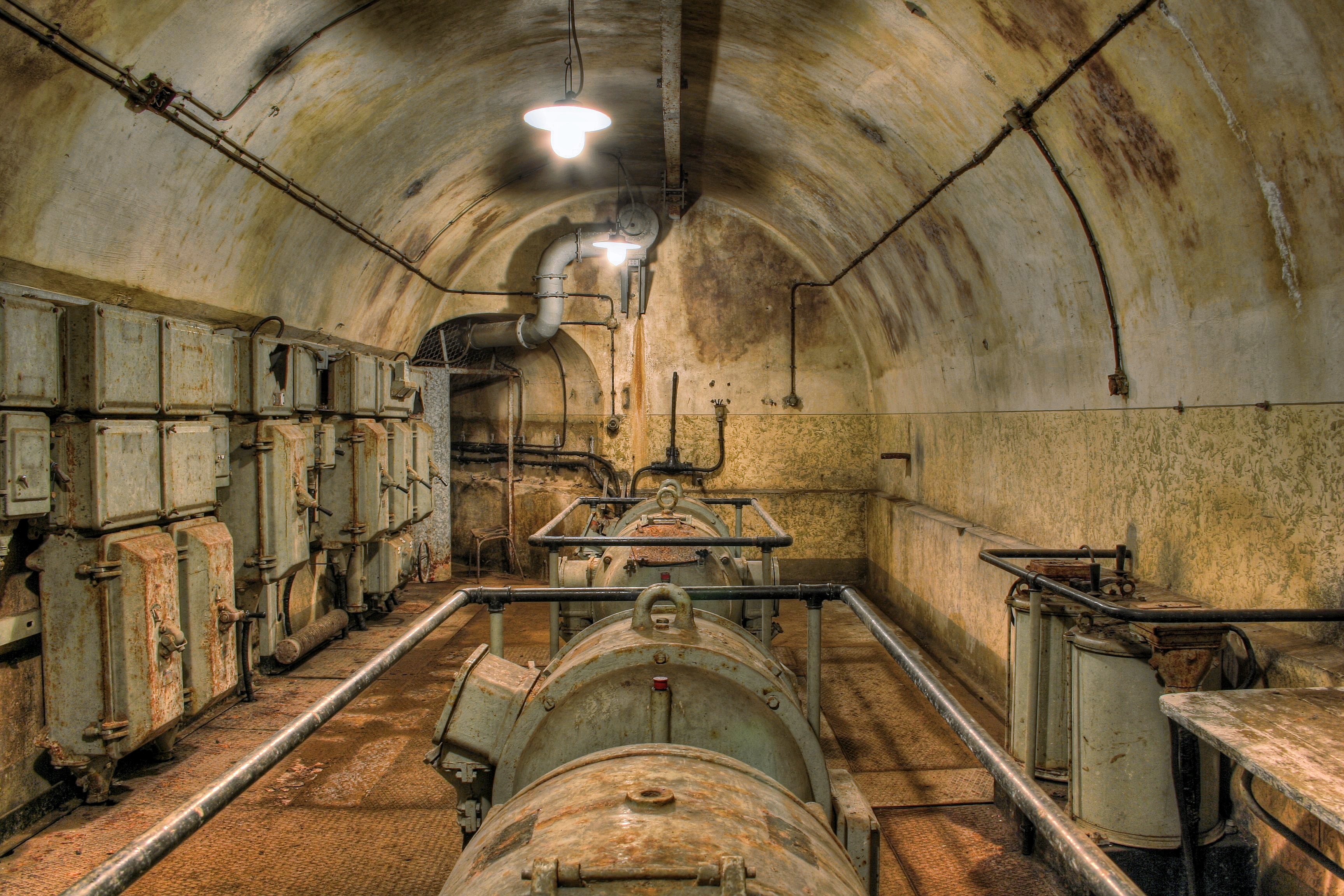 Gros Ouvrage du Michelsberg - Umformerstation